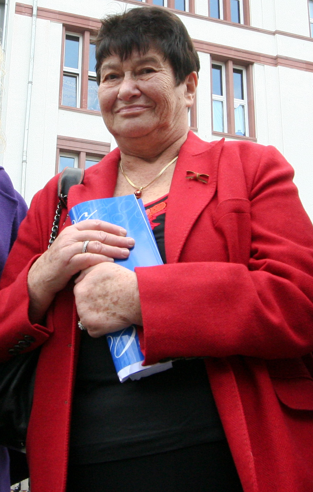 Portrait of Stefanie Zweig